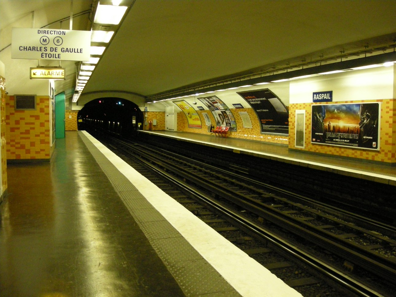 Quai de la station de métro Raspail Ligne 6